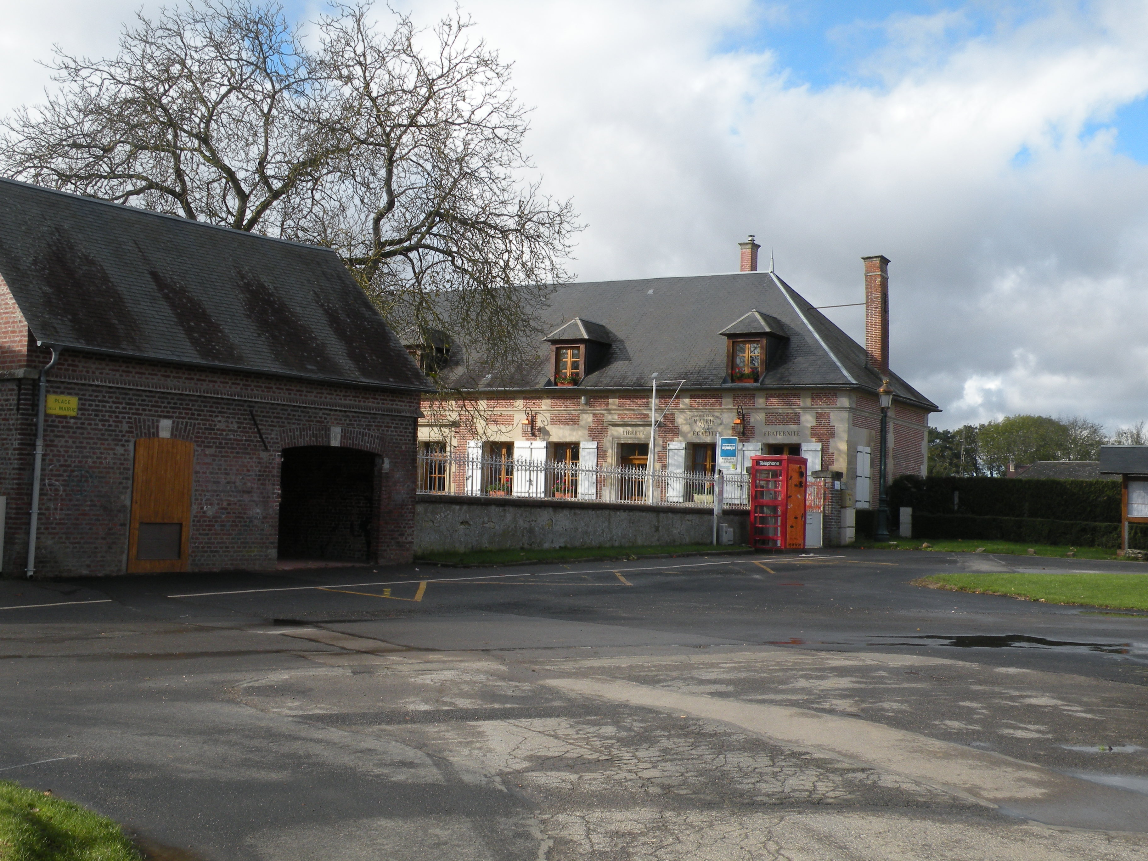 Novillers-les-Cailloux mairie